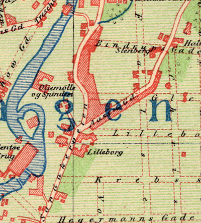 Lilleborg, Oslo.